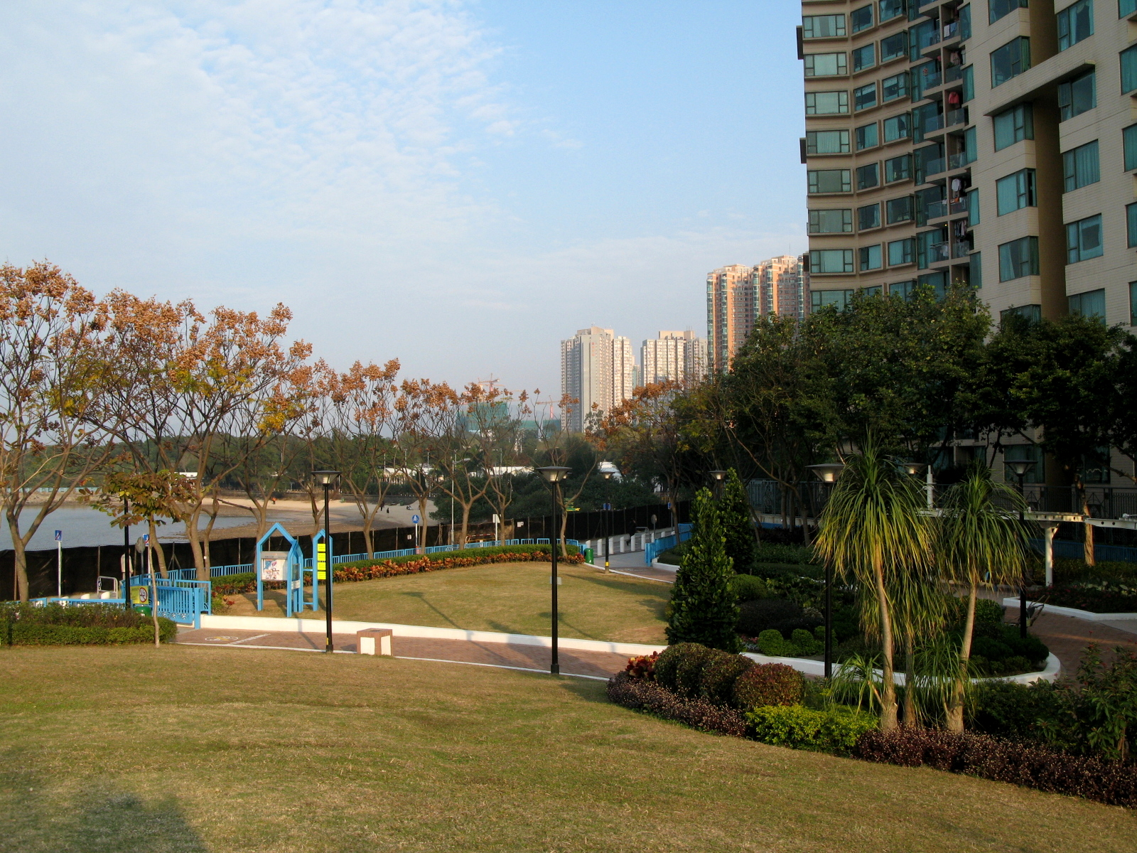 HK Ma On Shan Park